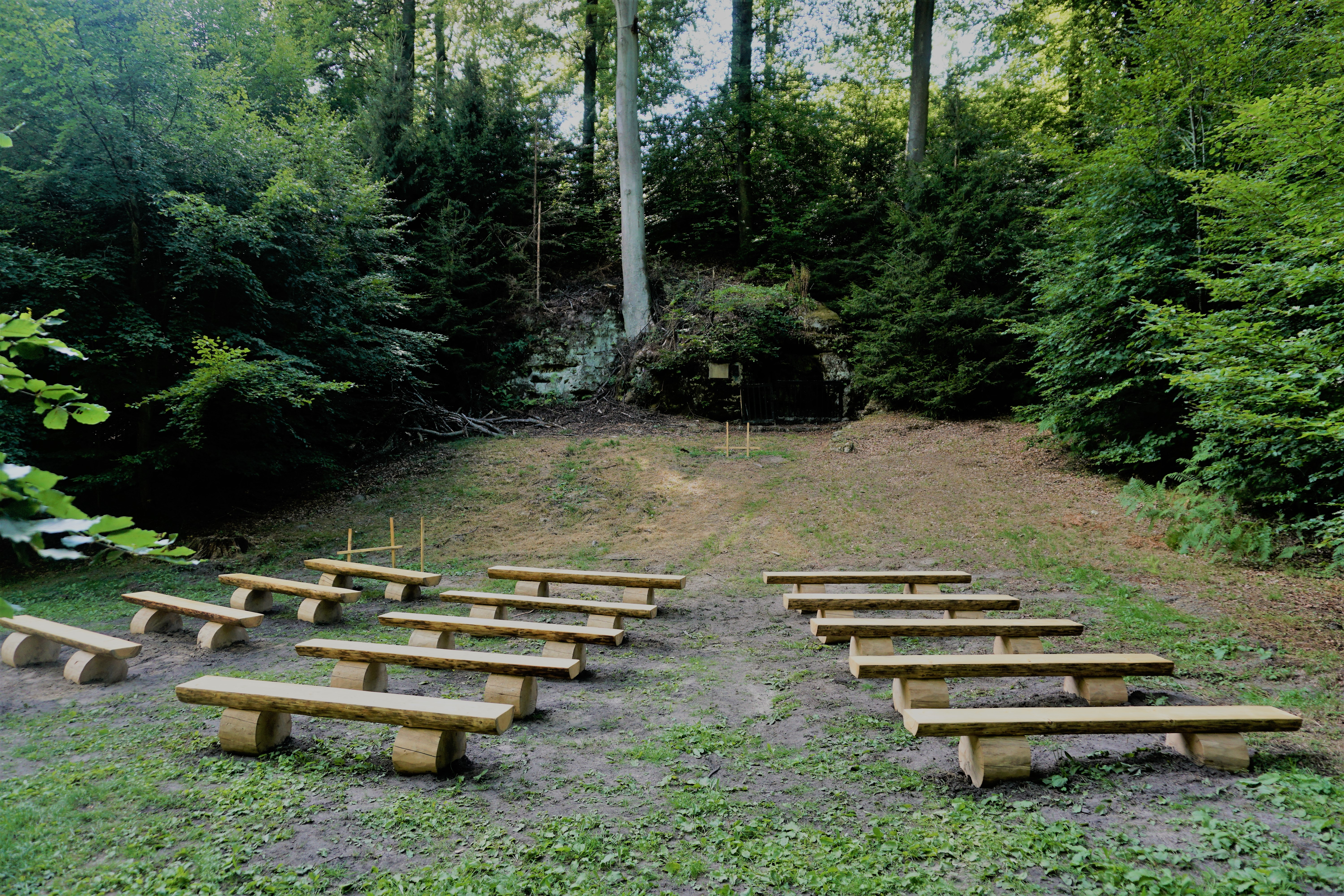 Grunewald, commune de Steinsel. Devant la grotte de Schetzel.